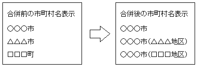 地域情報ナビの説明用画像